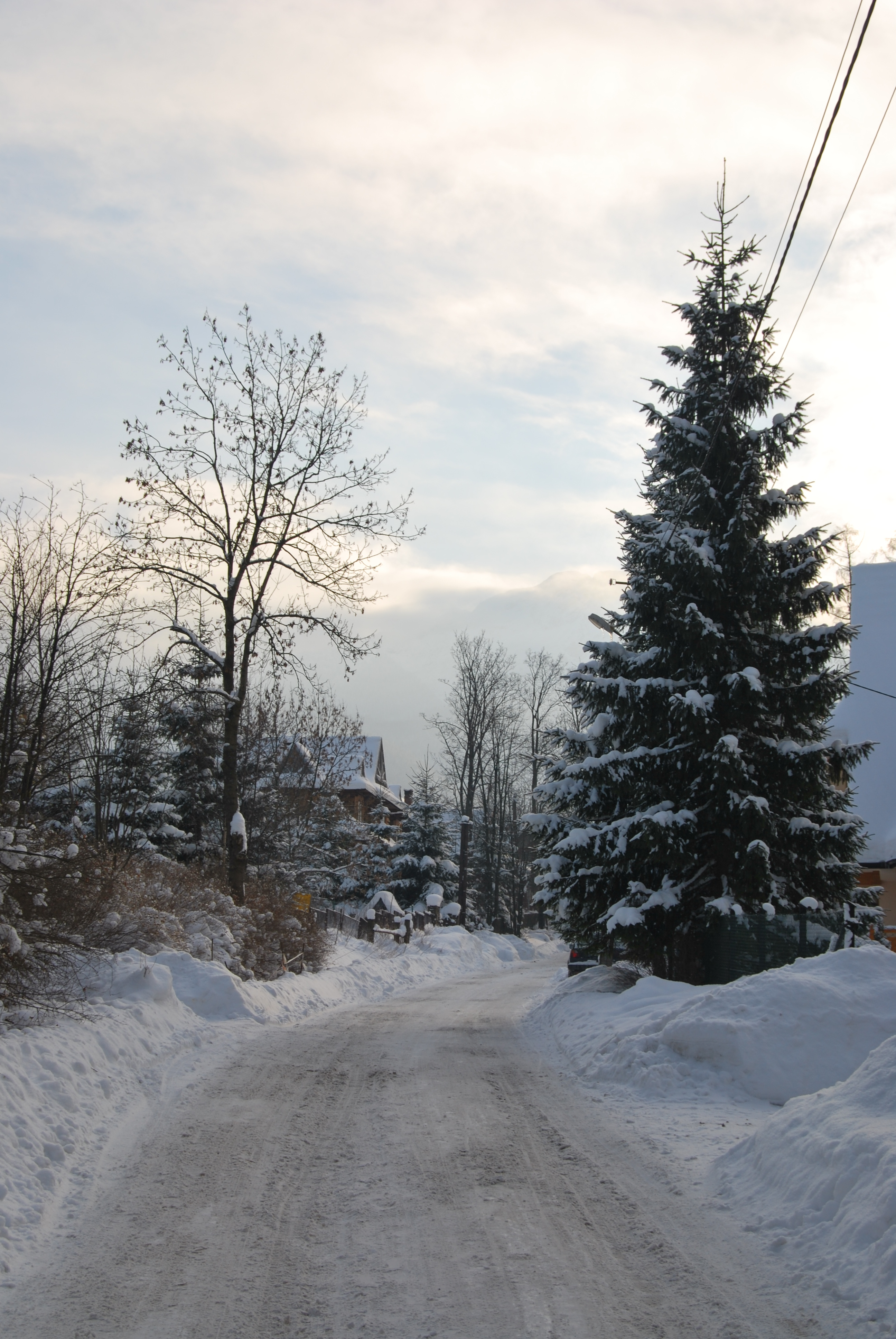 زكوبن مدينة في جنوبيّة بولنداw